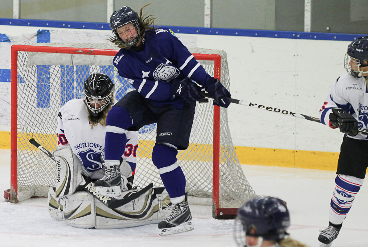 Leksand dam 2010-10-31, kämpar hårt, okänd spelare